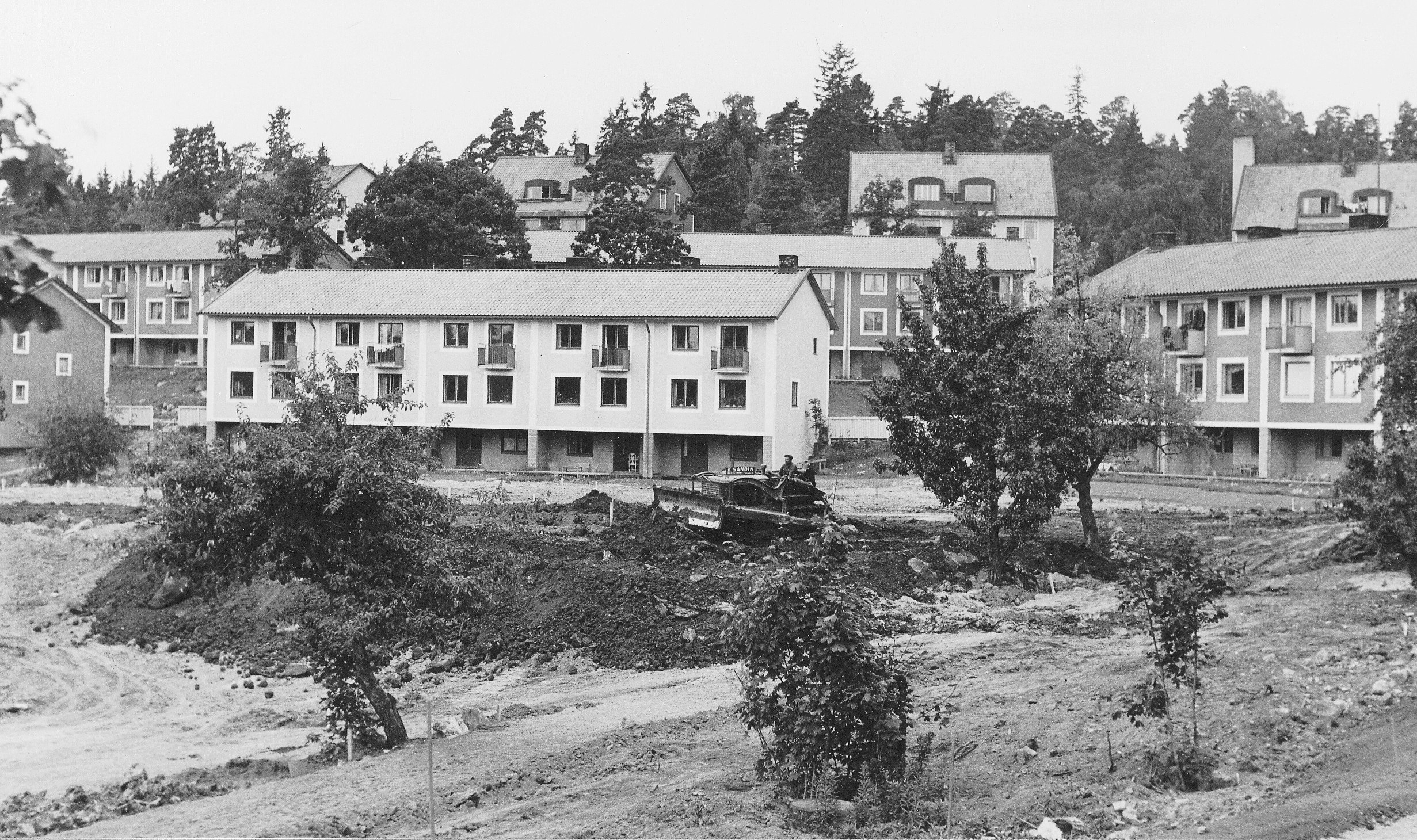 Bostadsområdet vid Rastvägen, Nockebyhov, arkitekt Ancker-Gate-Lindegren.